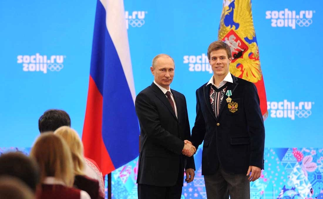 Орденом Дружбы награждён олимпийский чемпион и бронзовый призёр Олимпийских игр в фигурном катании Никита Кацалапов.